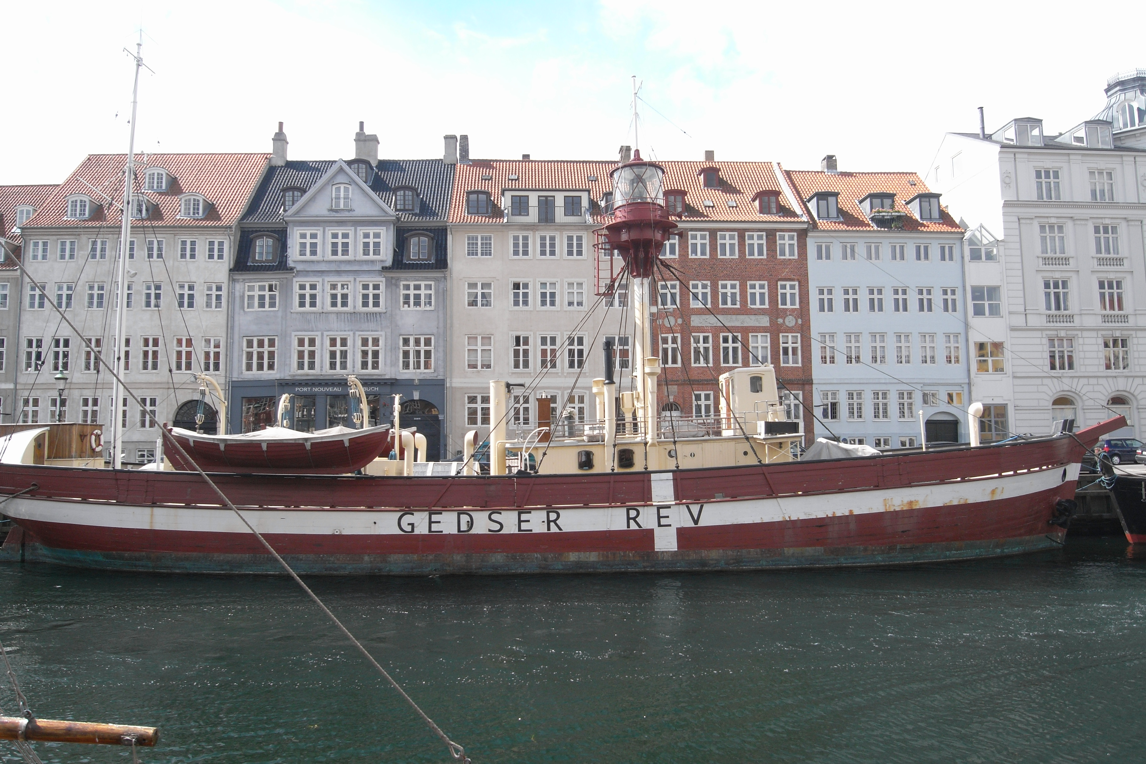 Lightvessel Gedser Rev at Nyhavn in Copenhagen, Denmark